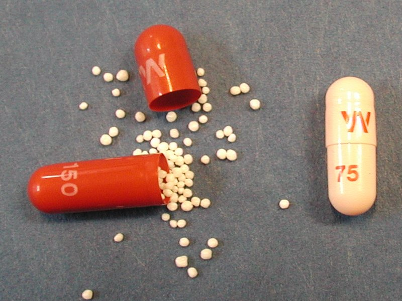 Efectin ER Kapsel 150mg und 75mg; 150mg Kapesel geöffnet